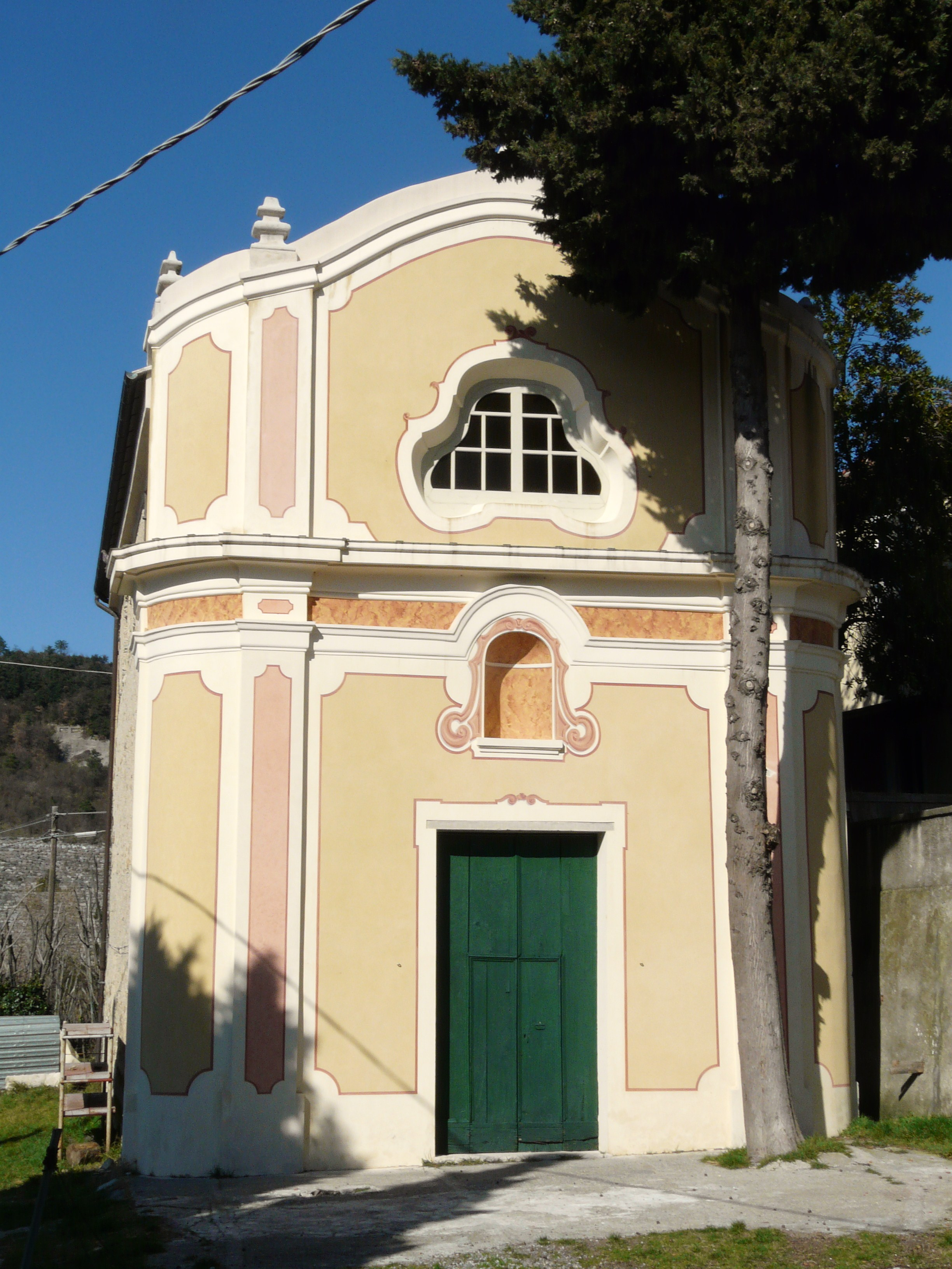 Oratorio presso la chiesa dei Santi Salvatore e del Santissimo Sepolcro, Vezzi Portio, Liguria, Italia